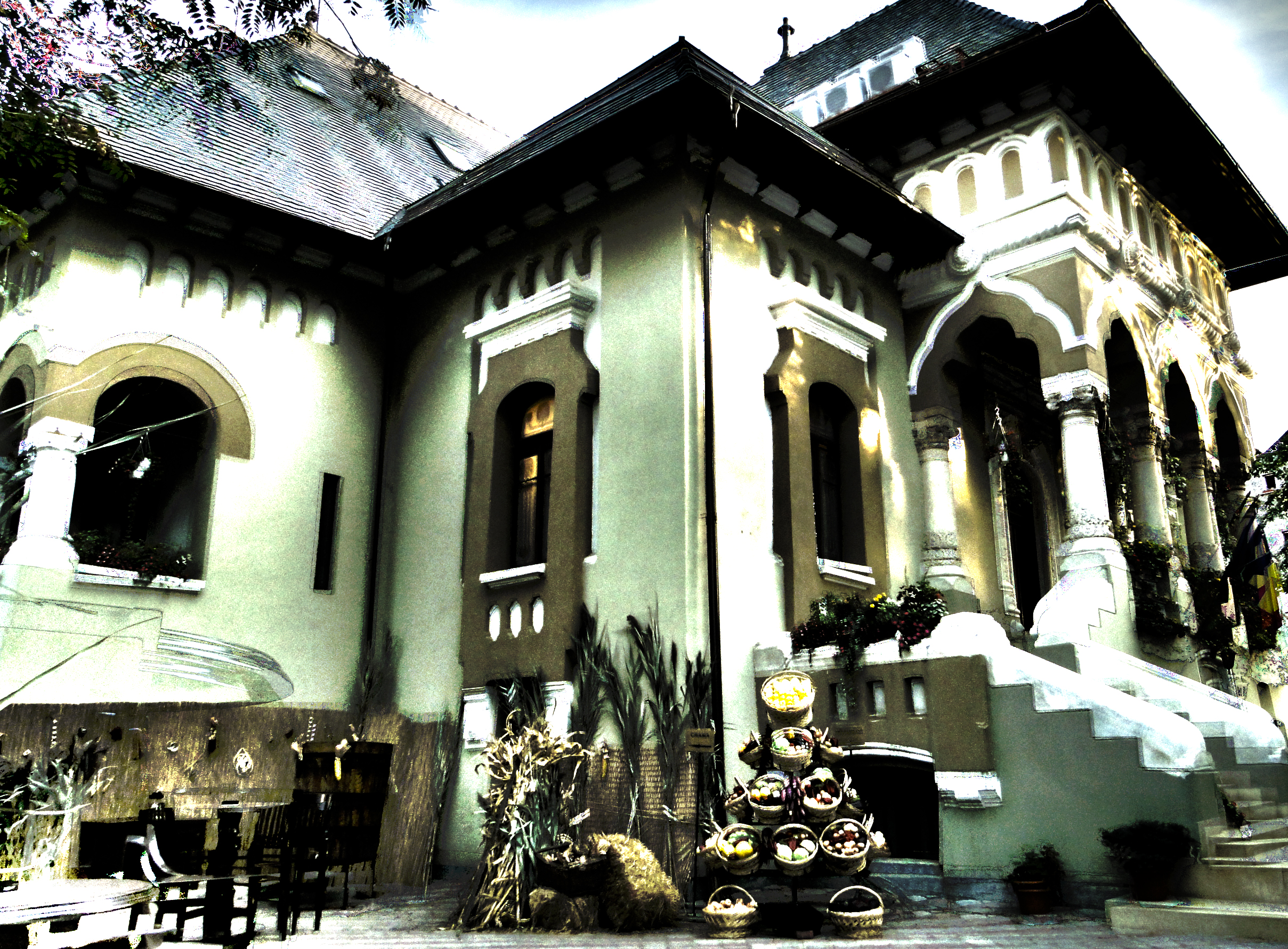 Casa Oprea Soare,construita in anul 1914 dupa planurile arhitectului Petre Antonescu, azi functioneaza ca restaurant(restaurantul Bucur). In contrast cu ambianta dens construita a cartierului , aceasta vila asezata in mijlocul unei curti , imita un conac rustic : un volum compact cu pridvoare deschise spre gradina intr-o arhitectura masiva ,cu o modenatura in relief puternic (braie,balustrade,rozete). Interiorul este bogat in finisaje de mestesuguri artistice - lambriuri sculptate,grinzi pictate